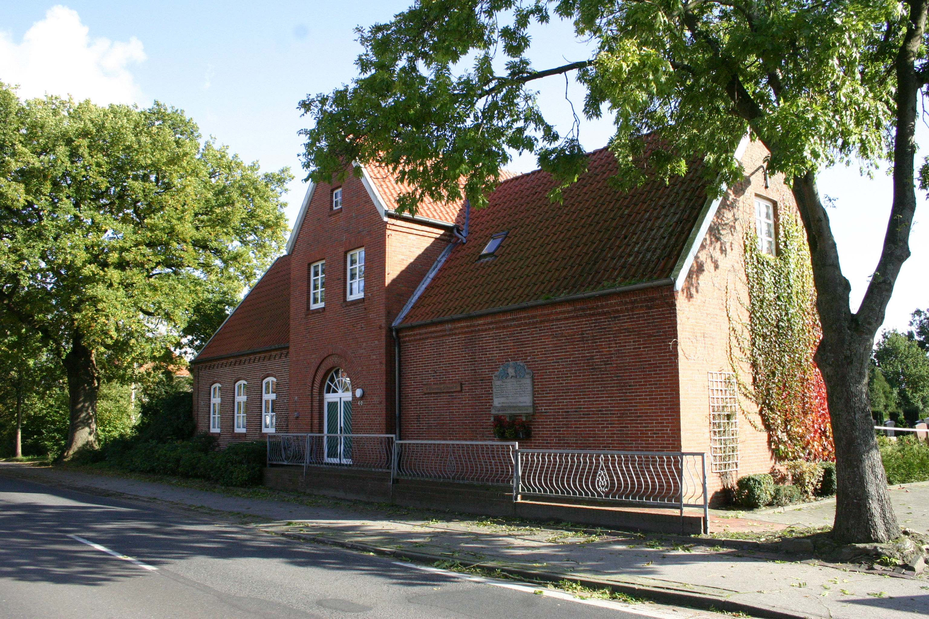 Schule in Schwerinsdorf